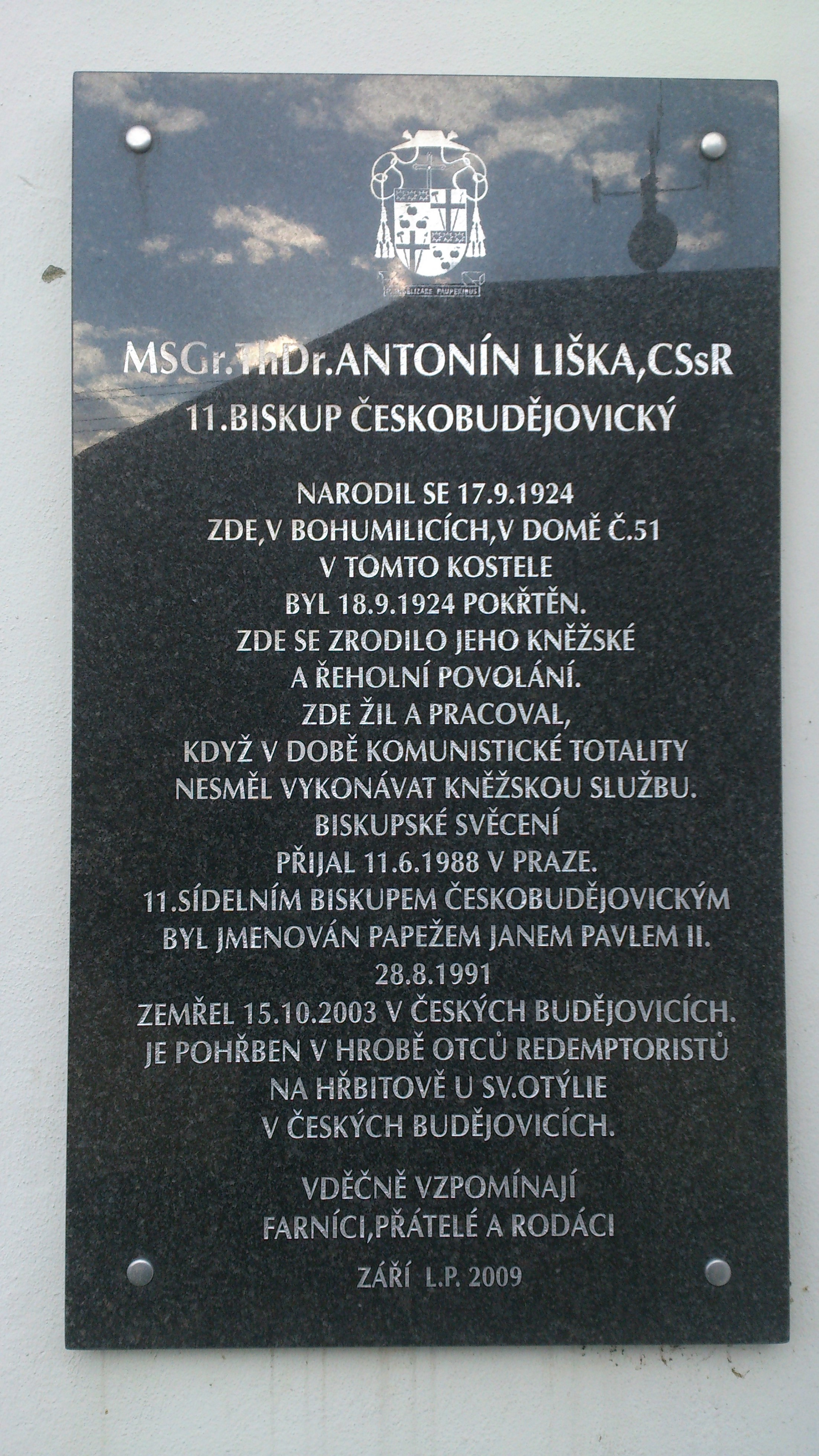 Pamětní deska Antonína Lišky u vchodu zdejšího kostela